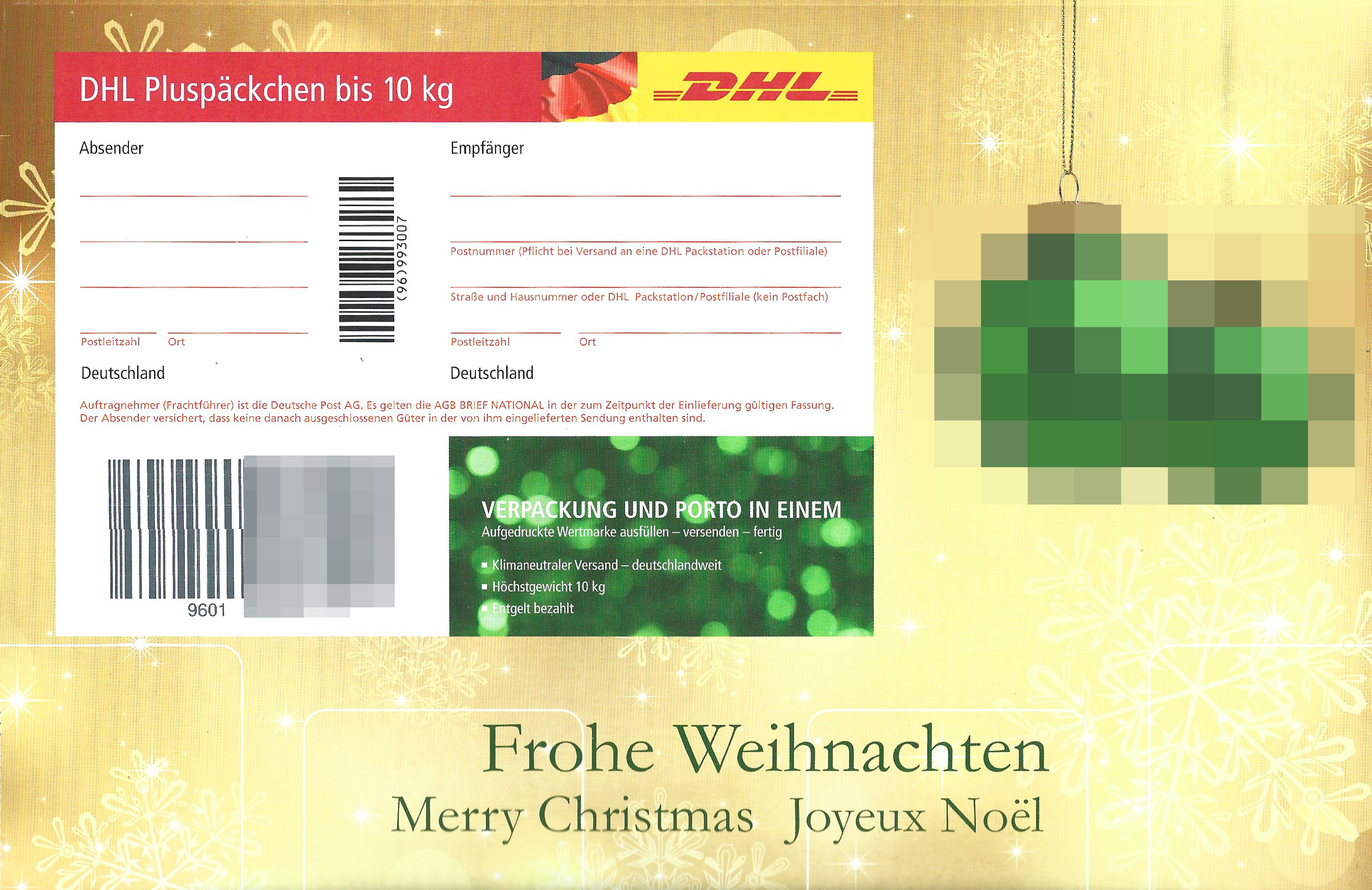 DHL Pluspäckchen bis 10 kg - Weihnachtsmotiv. Barcode mit der Paketnummer teilweise verpixelt, um Missbrauch zu vermeiden. Dazu Teile des Motivs aus urheberrechtlichen Gründen verpixelt.